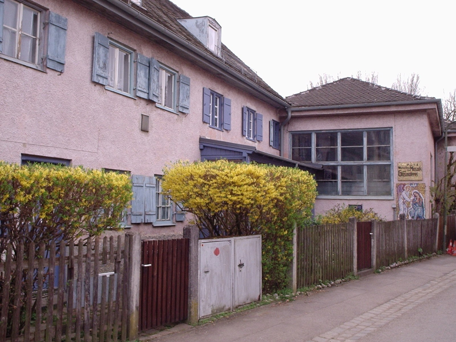 Glasmalerei und Mosaikanstalt Wilhelm Pütz, Faustnerweg 15, München-Solln.